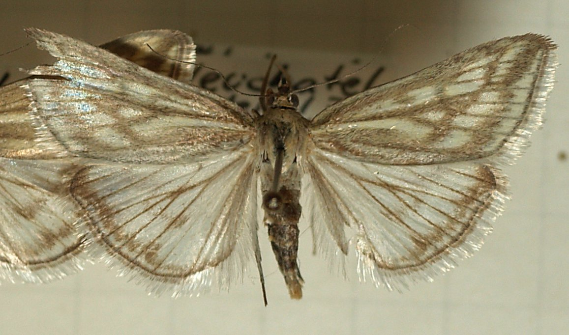 Loxostege virescalis